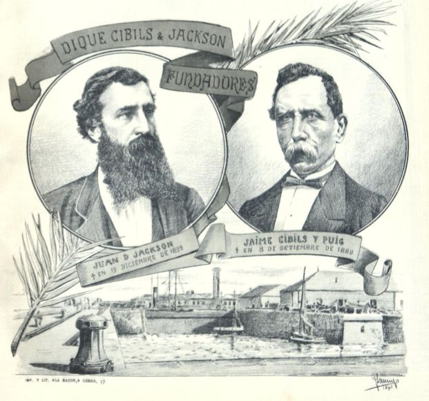 Dibujo realizado por Juan Bellver bajo el seudónimo Juan Sanuy (1856 - 1908) de los Dres. Jackson y Cibils